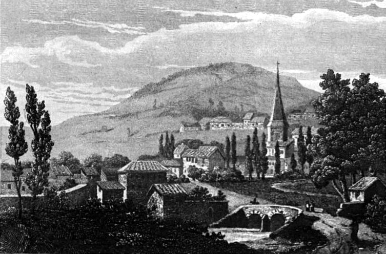 Image en provenance du livre : Eusèbe Girault de Saint-Fargeau, Guide pittoresque du voyageur en France, contenant la statistique et la description complète des quatre-vingt-six départements, orné de 740 vignettes et portraits gravés sur acier, de quatre-vingt-six cartes de départements et d'une grande carte routière de la France, par une Société de gens de lettres, de géographes et d'artistes, Paris, F. Didot frères, 1838, 6 volumes in-8° (BNF : 8-L25- 46). Volume III Didot frères, 1838. Route de Paris à Nice traversant les départements de l'Isère, des Hautes-Alpes, des Basses-Alpes et du Var. auteurs dessins : Rauch (ou autre) auteurs gravures : Skelton fils, Schroeder, Bishop (ou autre)